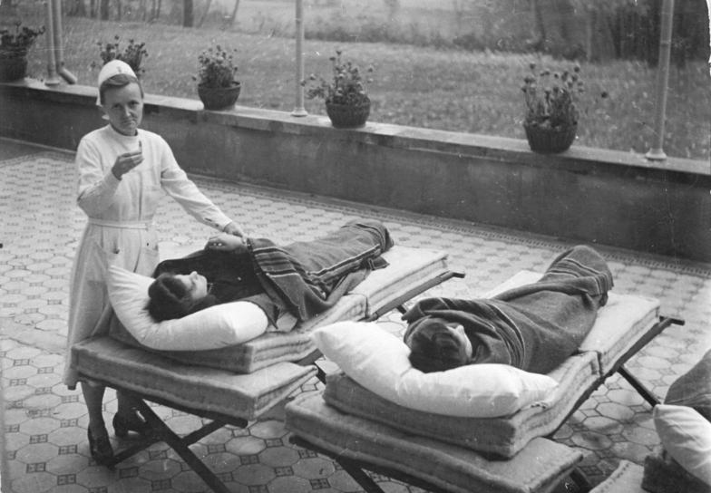 Bernau, Schloss Lanke, Tbc-Krankenhaus, Veranda Illus Klein 11.1.51 Kampf der Tuberkulose. Das Schloß Lanke bei Bernau, früher von Adligen bewohnt, ist heute ein modern eingerichtetes Tbc-Krankenhaus und bietet mit seiner herrlichen Umgebung den Genesung-Suchenden eine ideale Erholungsstätte. Neue technische Apparate zur Bekämpfung von Tuberkulose beschleunigen den Heilprozeß der Patienten. UBz: In einer überdachten Glasveranda machen die Patienten ihre täglichen Liegekuren.